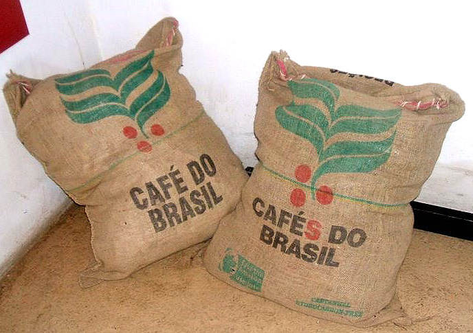 Sacos de café, Casa do Bandeirante, São Paulo, Brasil.